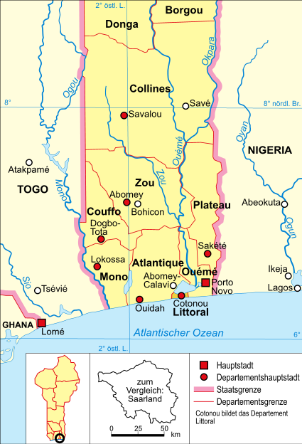 Politische Karte Benins (Departement Littoral hervorgehoben)